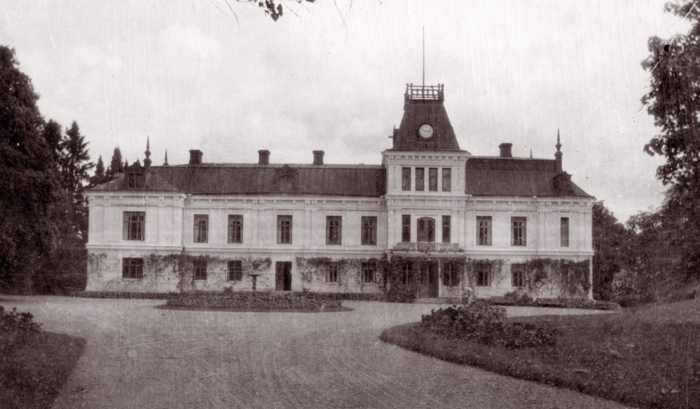 Fogelstad